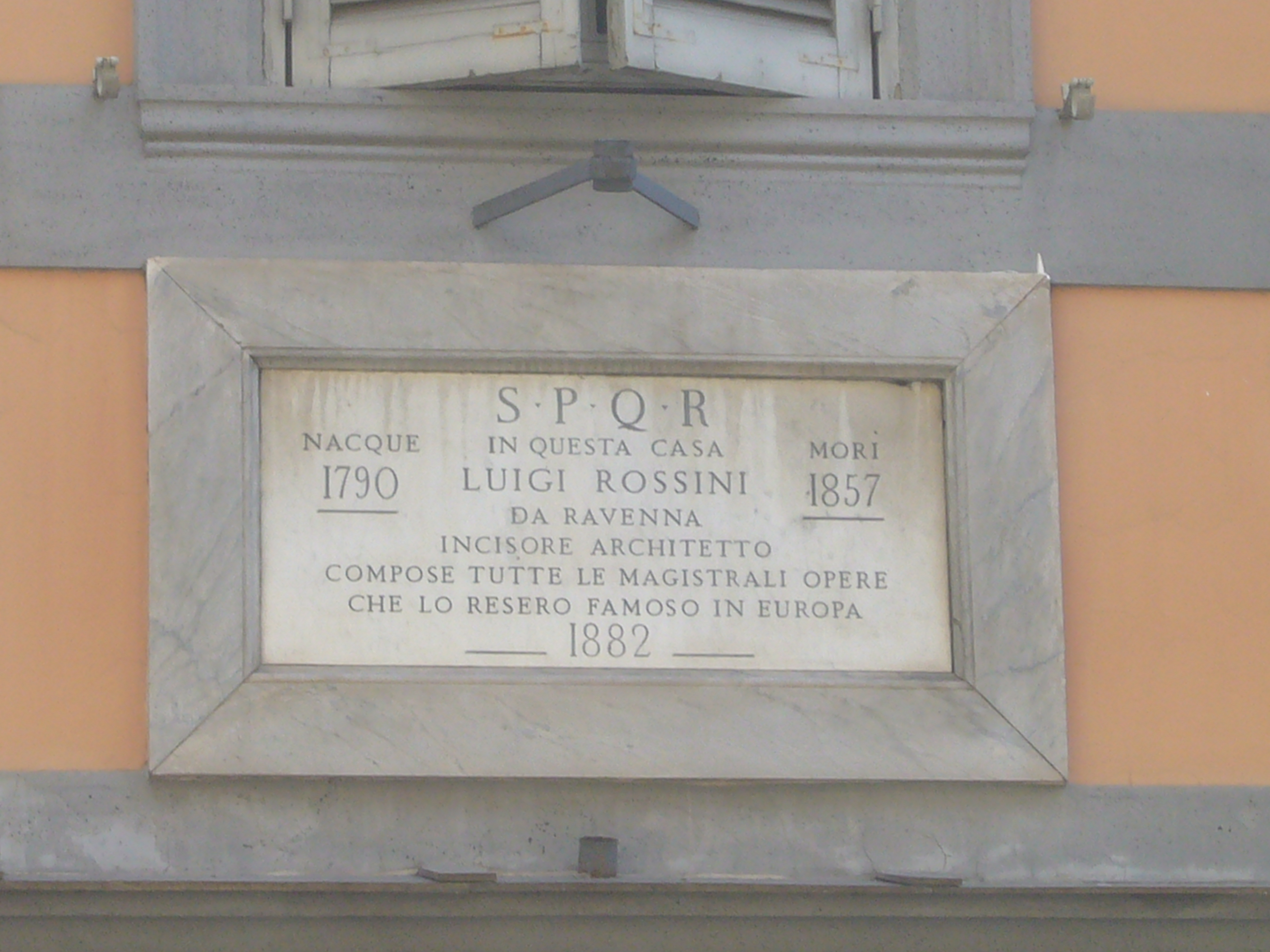 Roma, memoria di Luigi Rossini sulla casa al 138 di via Sistina dove abitò dal 1822 alla morte.